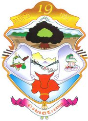 Este es el escudo de la Alcaldía Municipal de El Tránsito, San Miguel, El Salvador